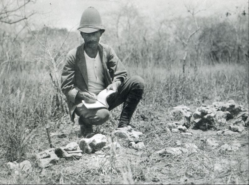 Werner Janensch: Fotoabzug aus einem Album zur Tendaguru-Expedition. Das Foto trägt eine Bildunterschrift von Werner Janensch: "Ego beim Eintragen ins Fundbuch"